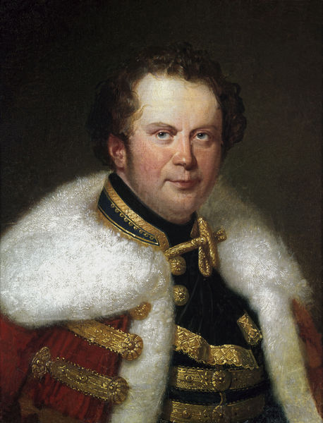 Gemälde, Painting